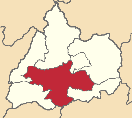 Mapa localizador del cantón en Cotopaxi, Ecuador